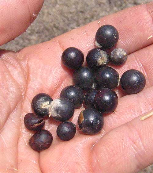 Sapindus saponaria seeds